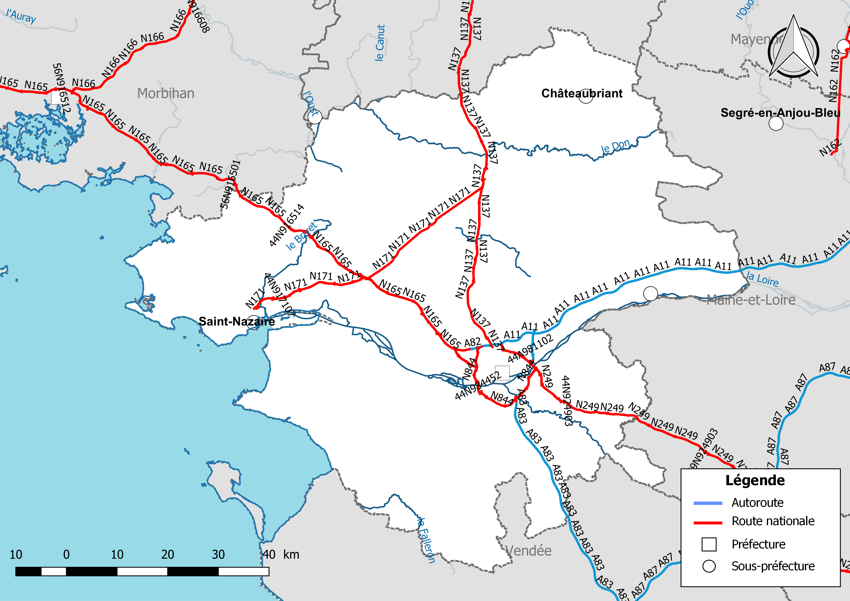 Carte du réseau routier national, constitué des autoroutes et des routes nationales, dans le département de la Loire-Atlantique (France). Situation au 1er janvier 2019.